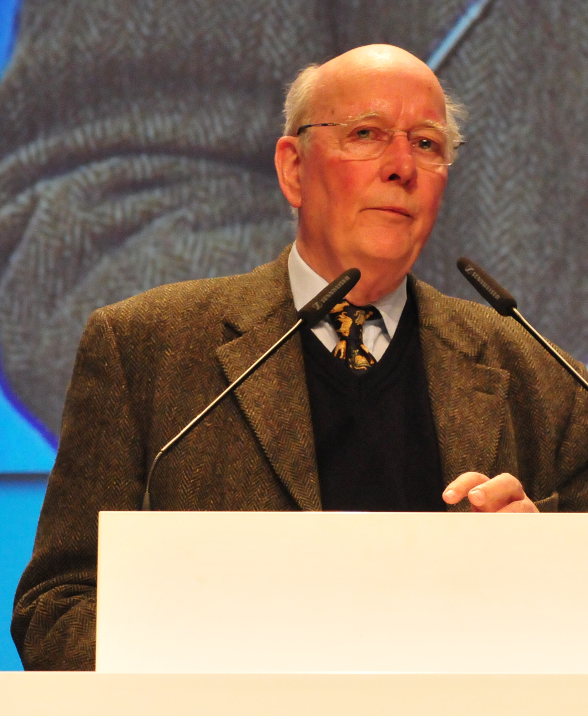 AfD Bundesparteitag am 1. Februar 2015 in Bremen